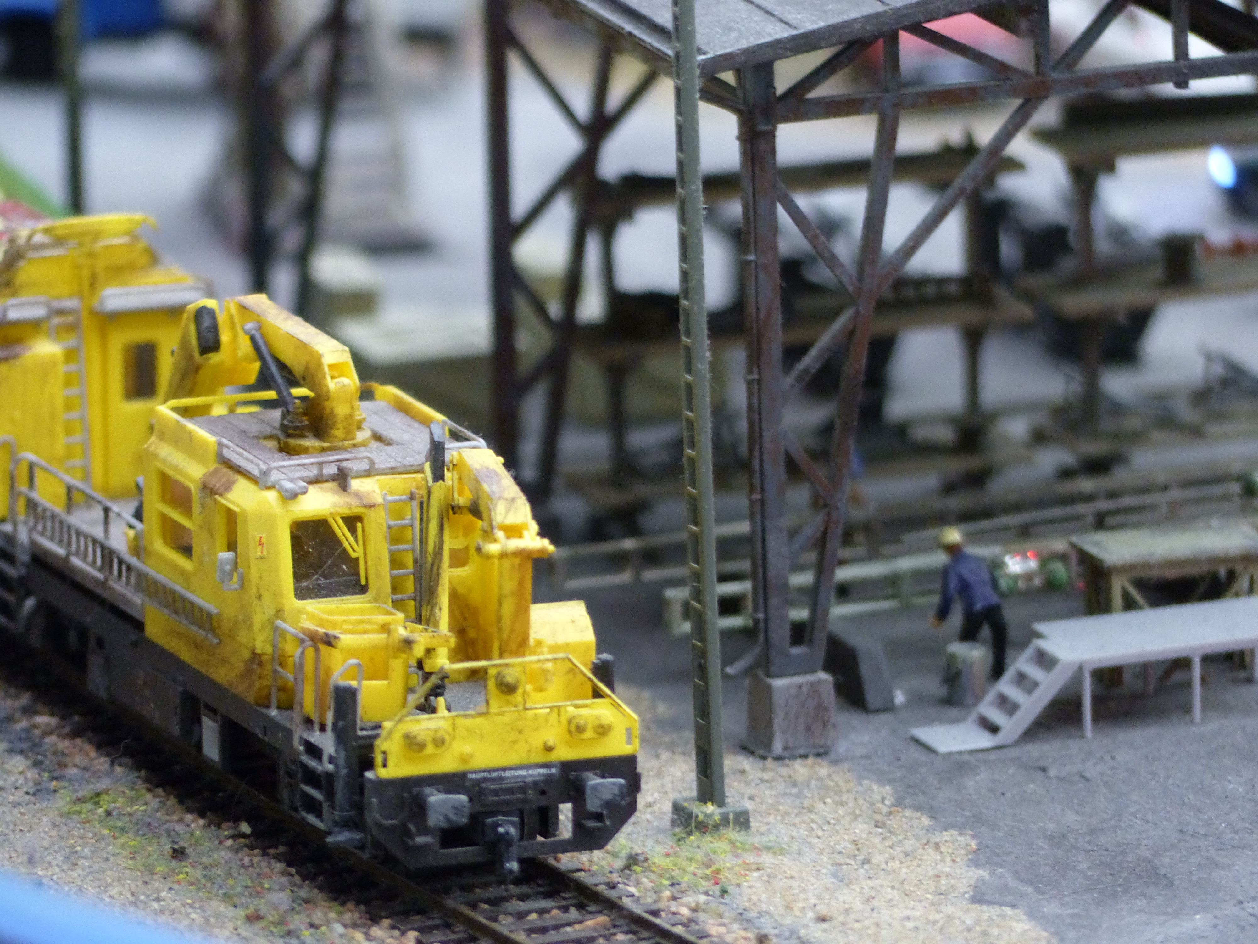 Grand Maket Russia, San Petesburgo